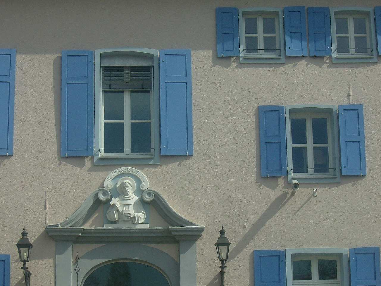 Haus Berg (Detail), Hückelhoven-Brachelen, NRW